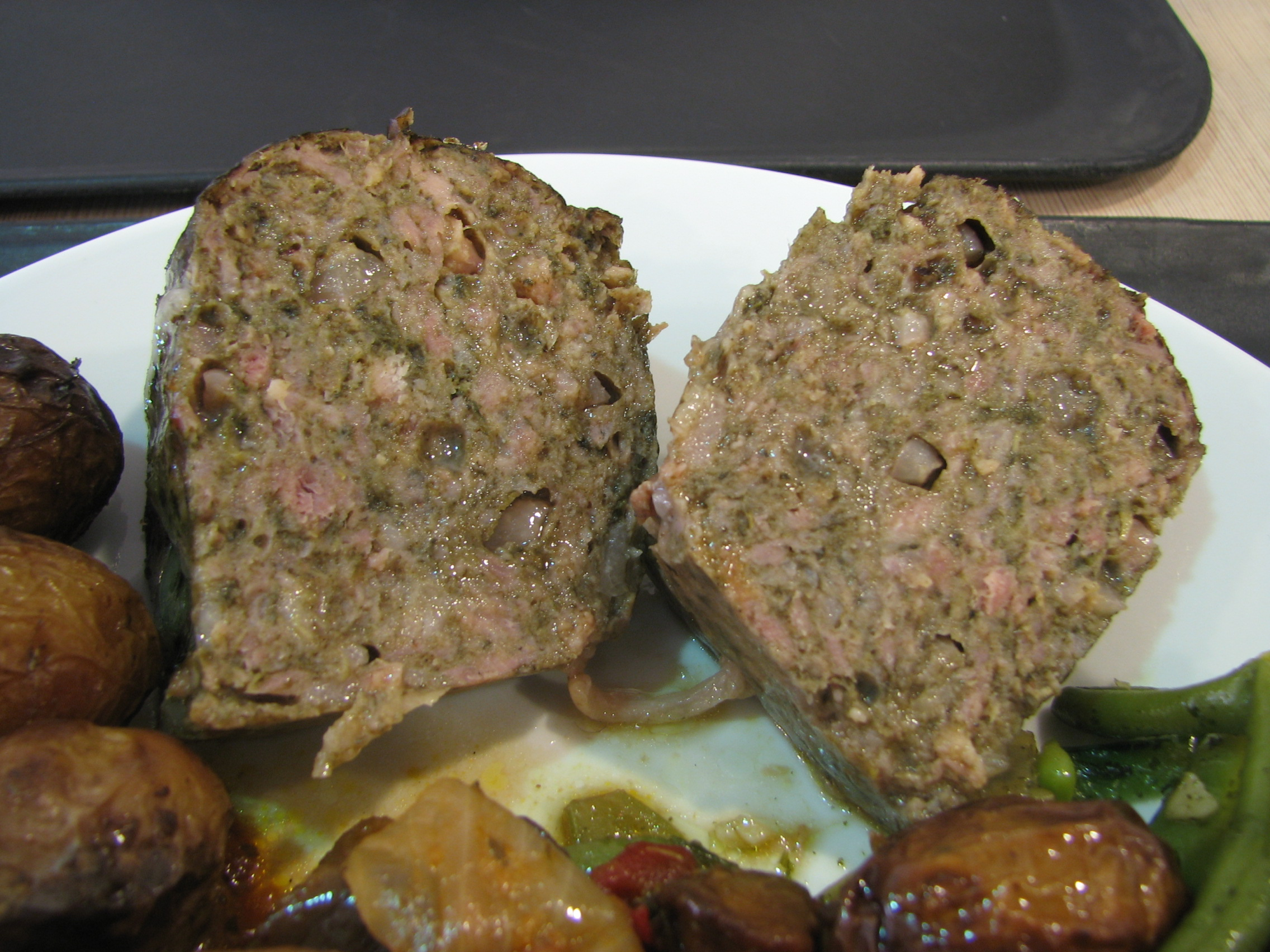 Caillette ardéchoise